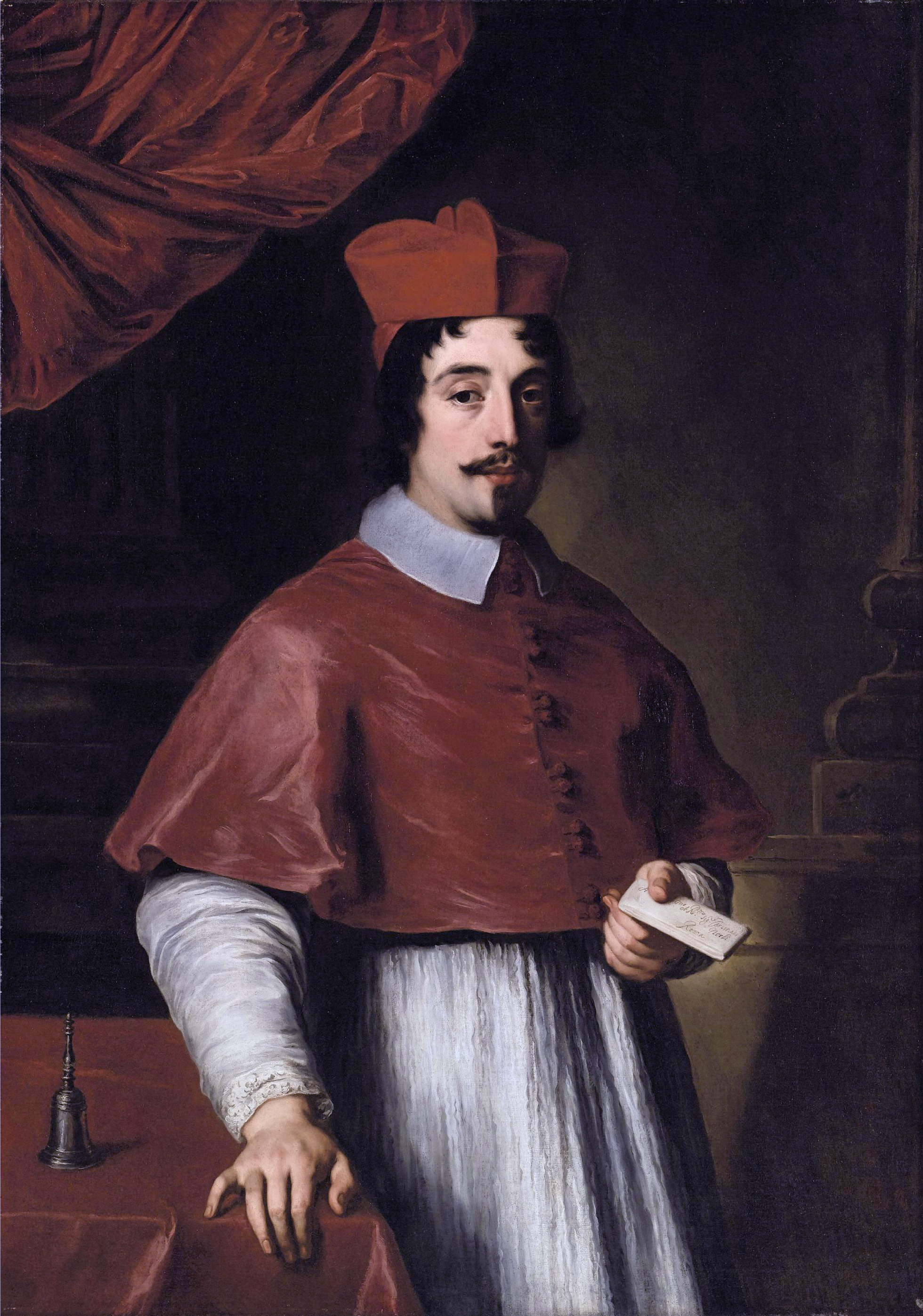 Cardinal Francesco Nerli (1636-1708)